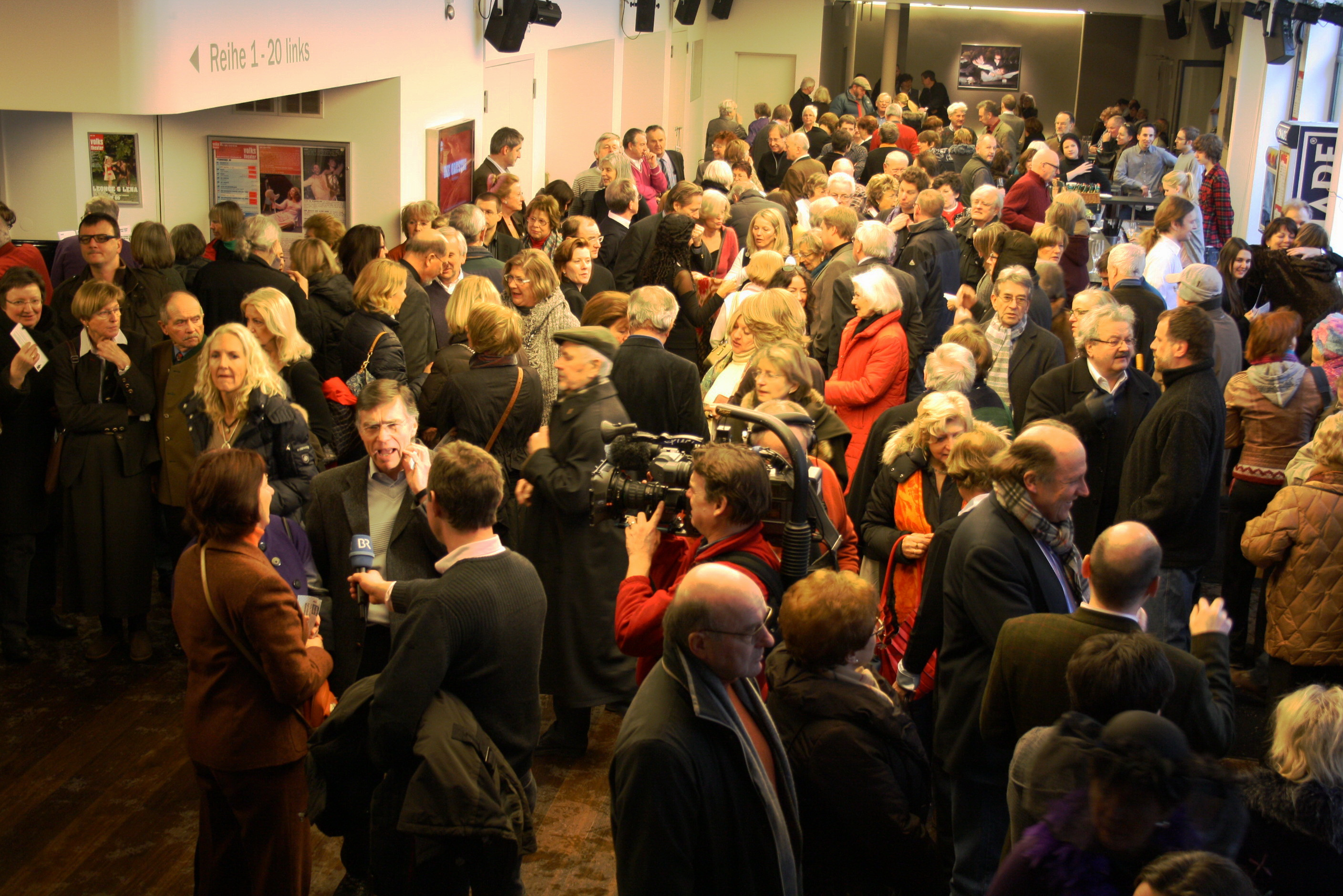 Foyer des Volkstheater München bei der Verleihung des Großen Karl Valentin Preises. Bayerischen Fernsehens bei der Aufnahme.